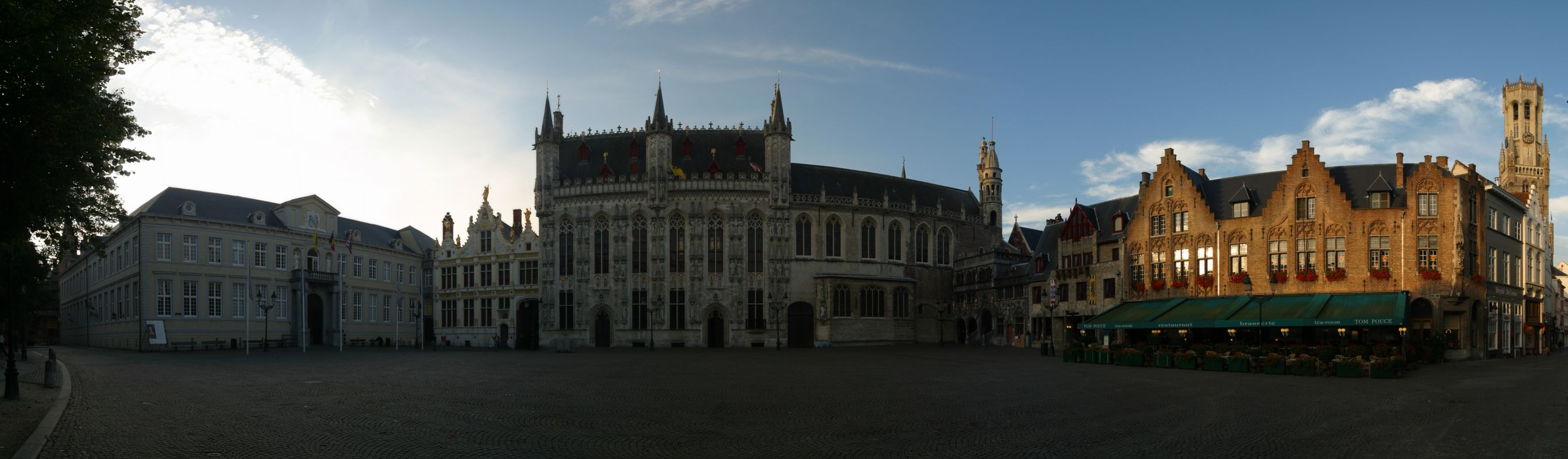 Bruges